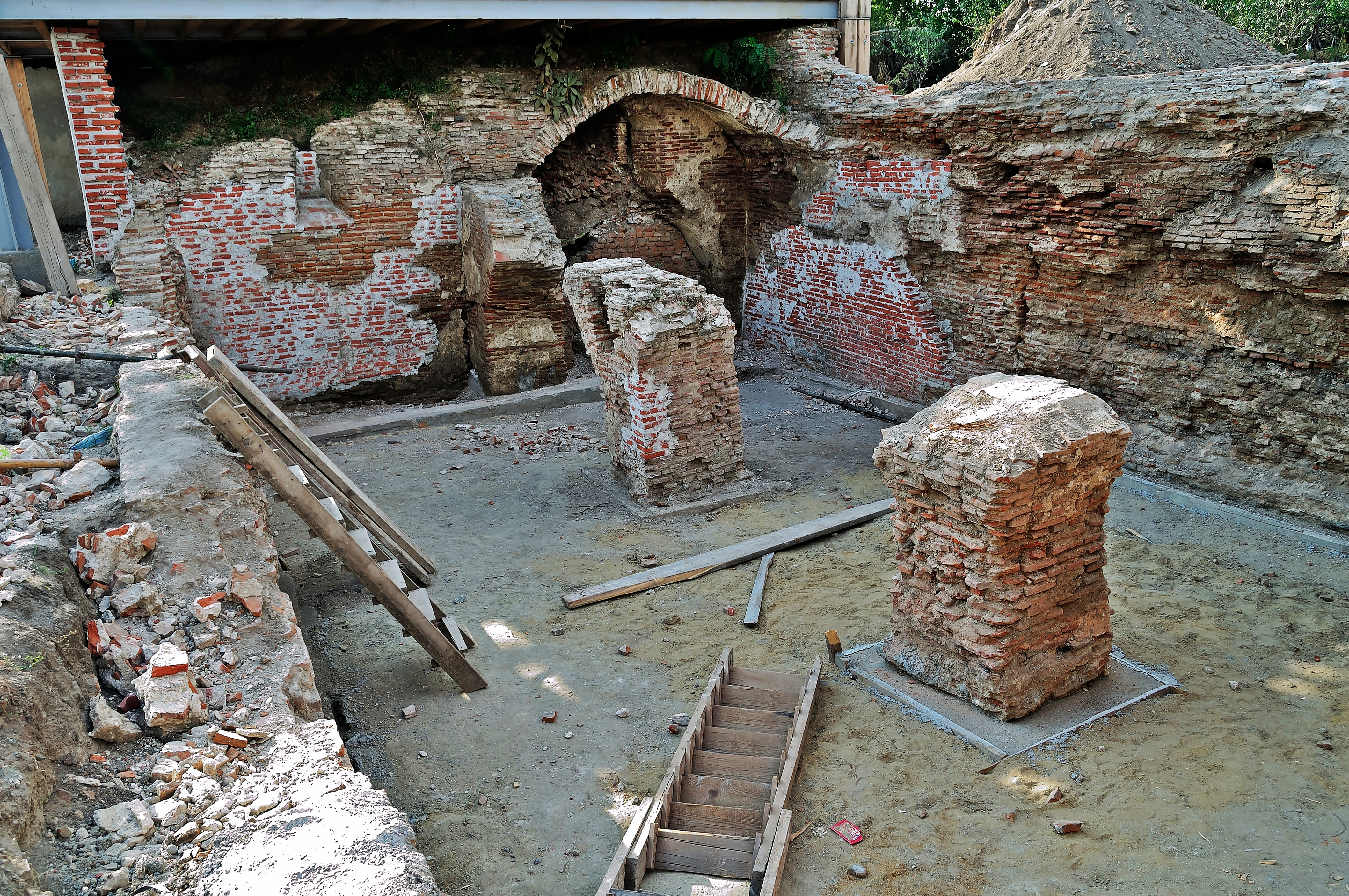 Chilii (ruine) 02